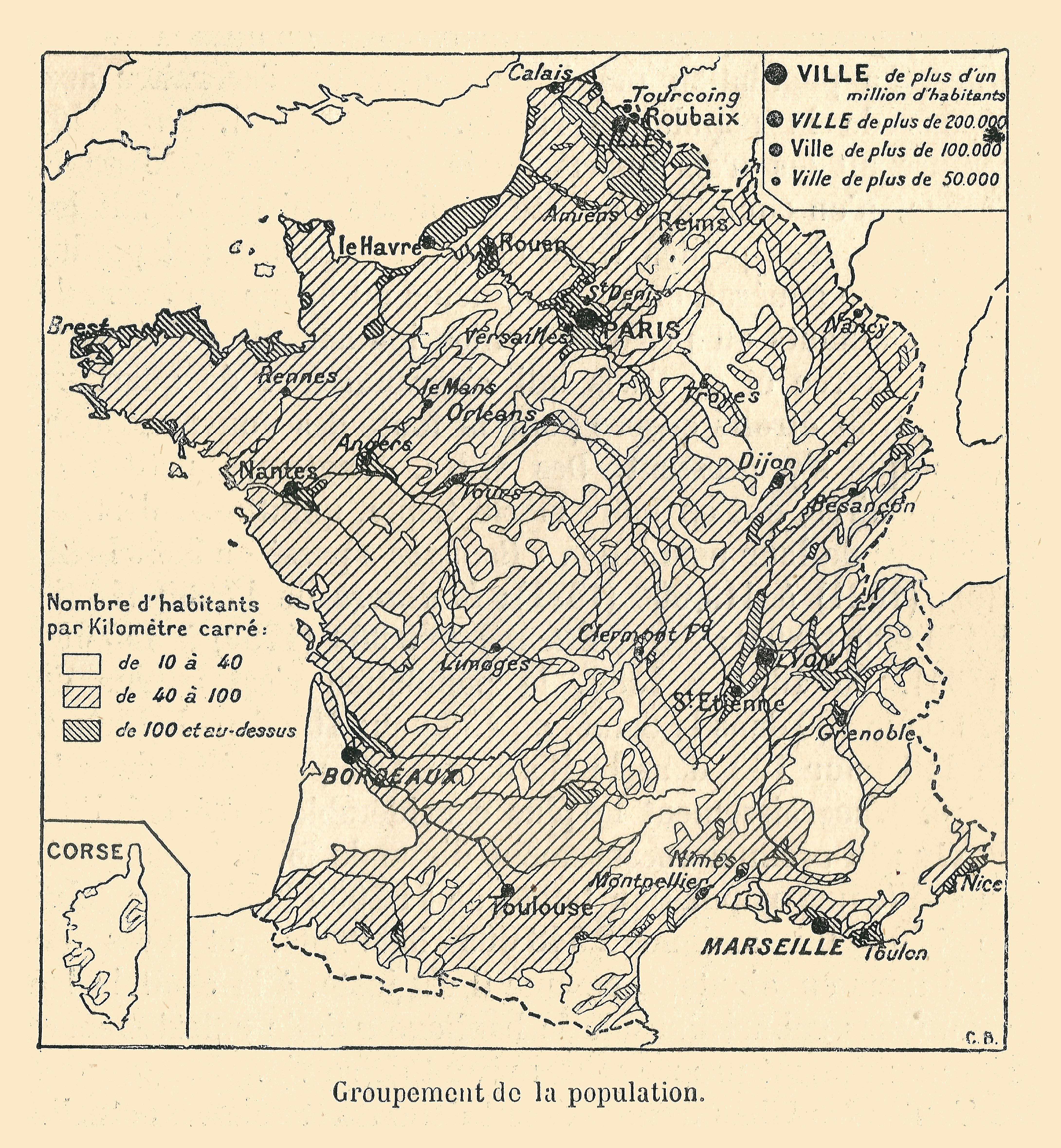 Carte de Franz Schrader